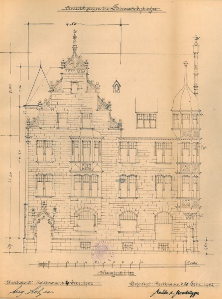 Zeichnung des Hauses Bismarckstraße 15, Heilbronn, von Maute und Moosbrugger, aus dem Baugesuch. Stadtarchiv Heilbronn, Signatur A034-1593. Das Haus wurde für den Schlossermeister August Stotz gebaut und gehörte später dem Kaufmann Hermann Wolf